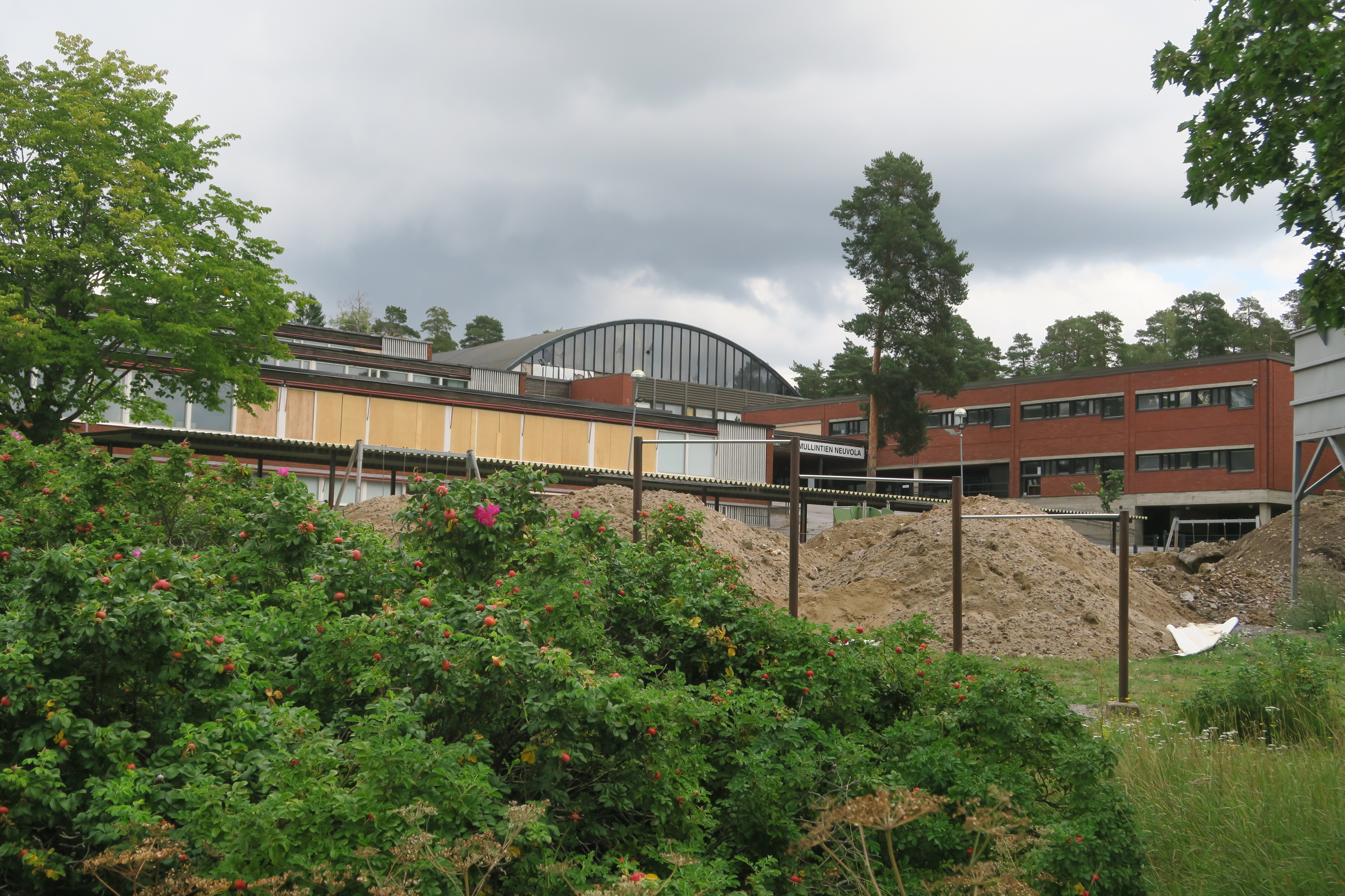 Entinen Pernon lukion rakennus Turussa elokuussa 2018